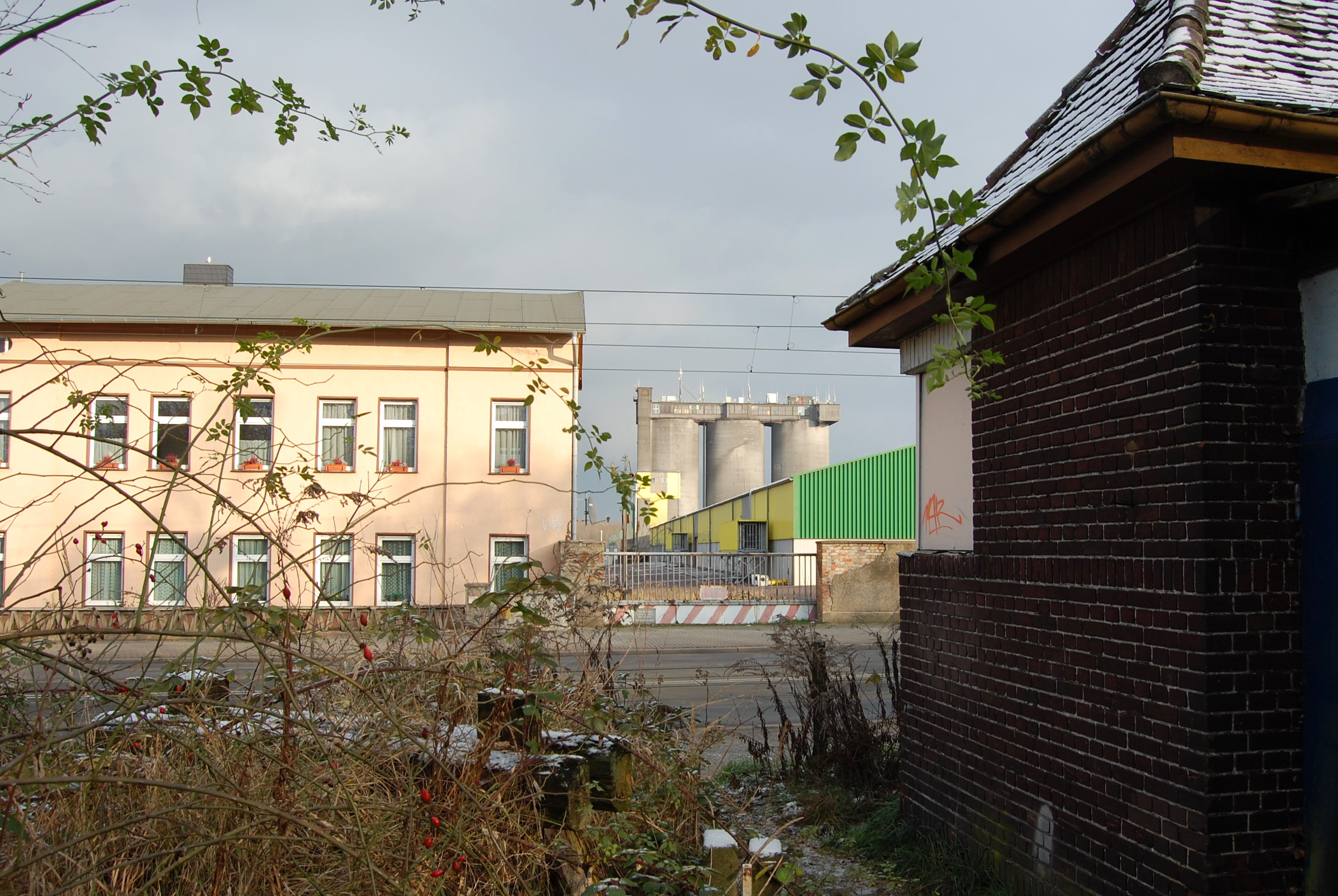 ehemaliger Bahnübergang über die Straße Alt Westerhüsen vom Bahnhof Magdeburg Südost zu Fahlberg-List